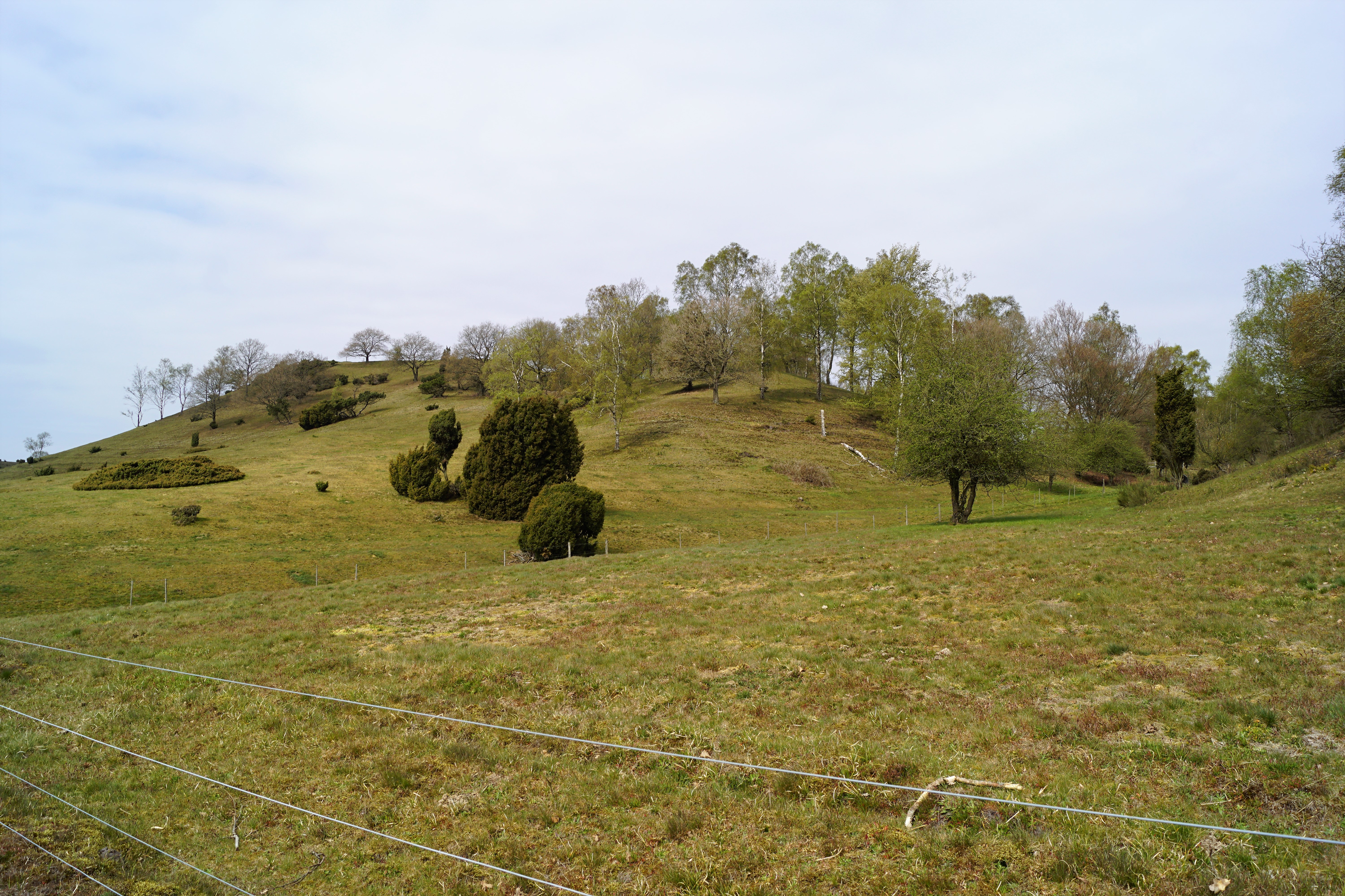 De fredede Læsten Bakker vest for Randers